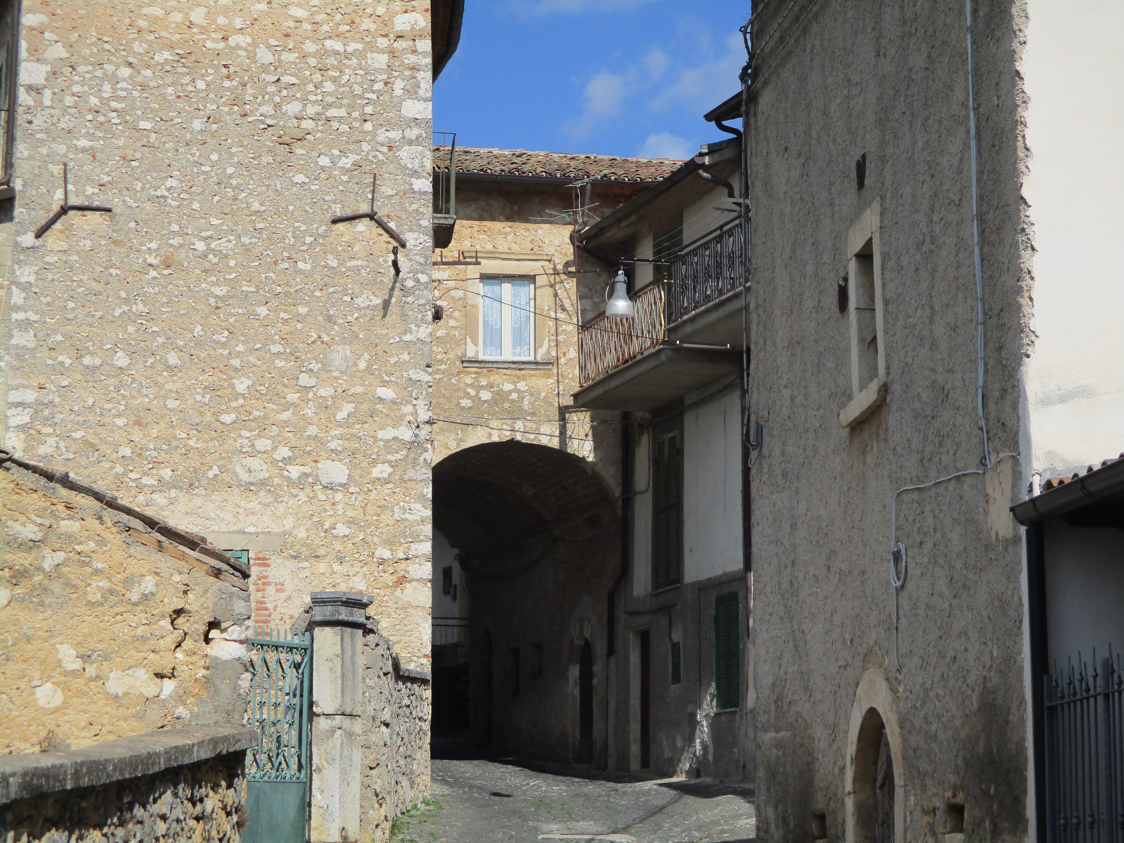 La porta del paese